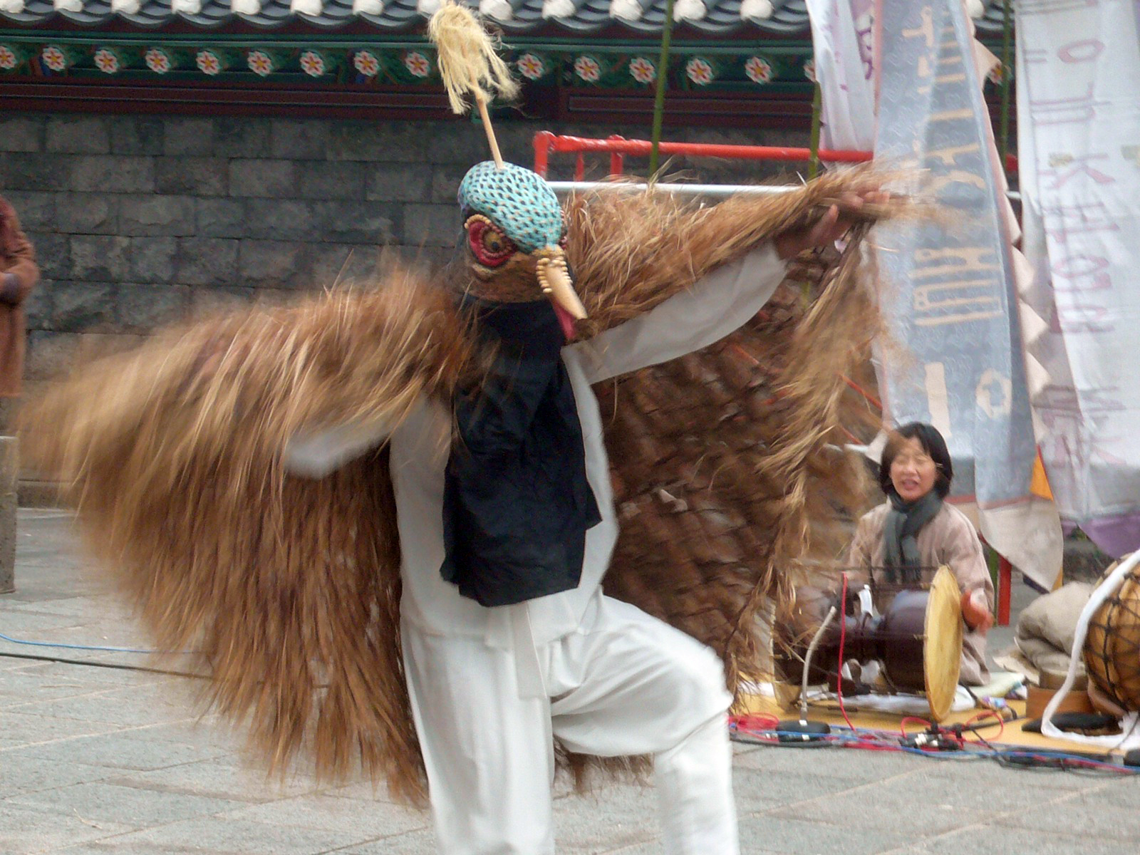 Talchum, Korean mask dance